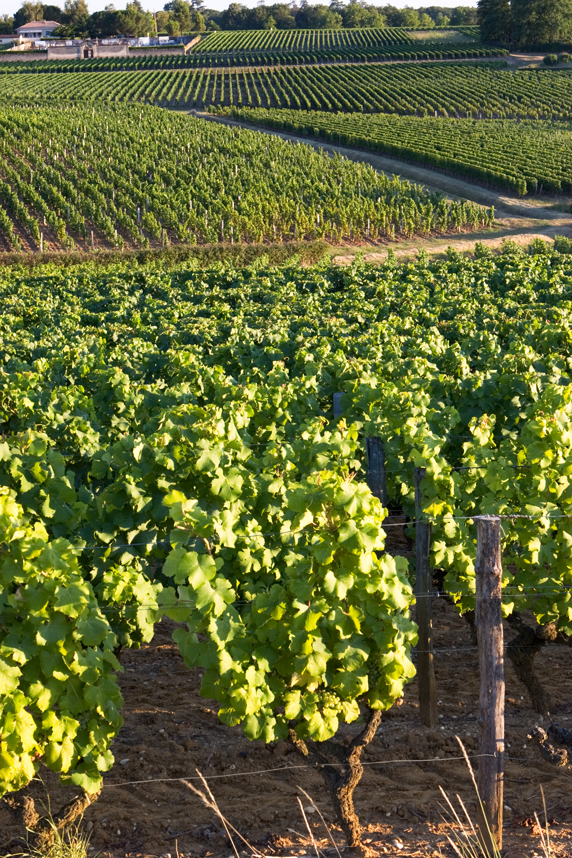 Village et vignoble, Sauternes, France.